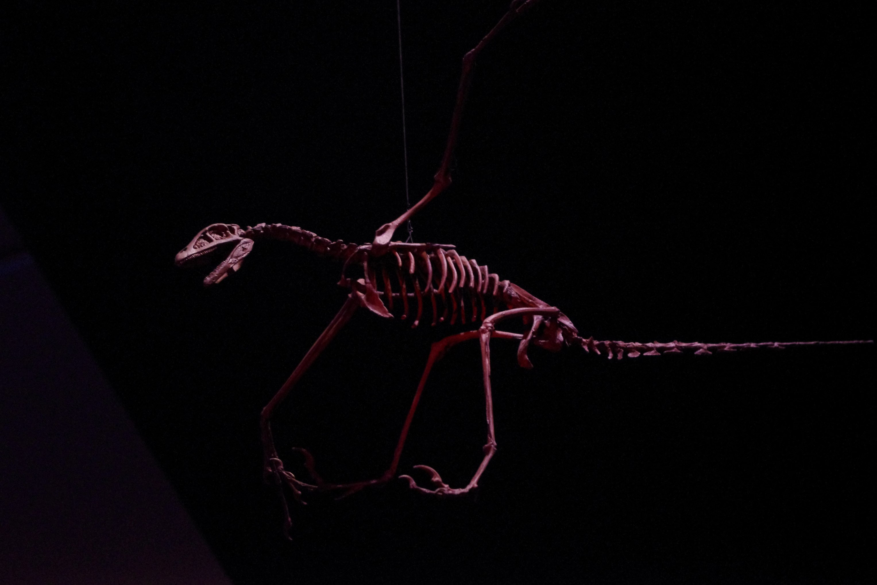 Rahonavis.